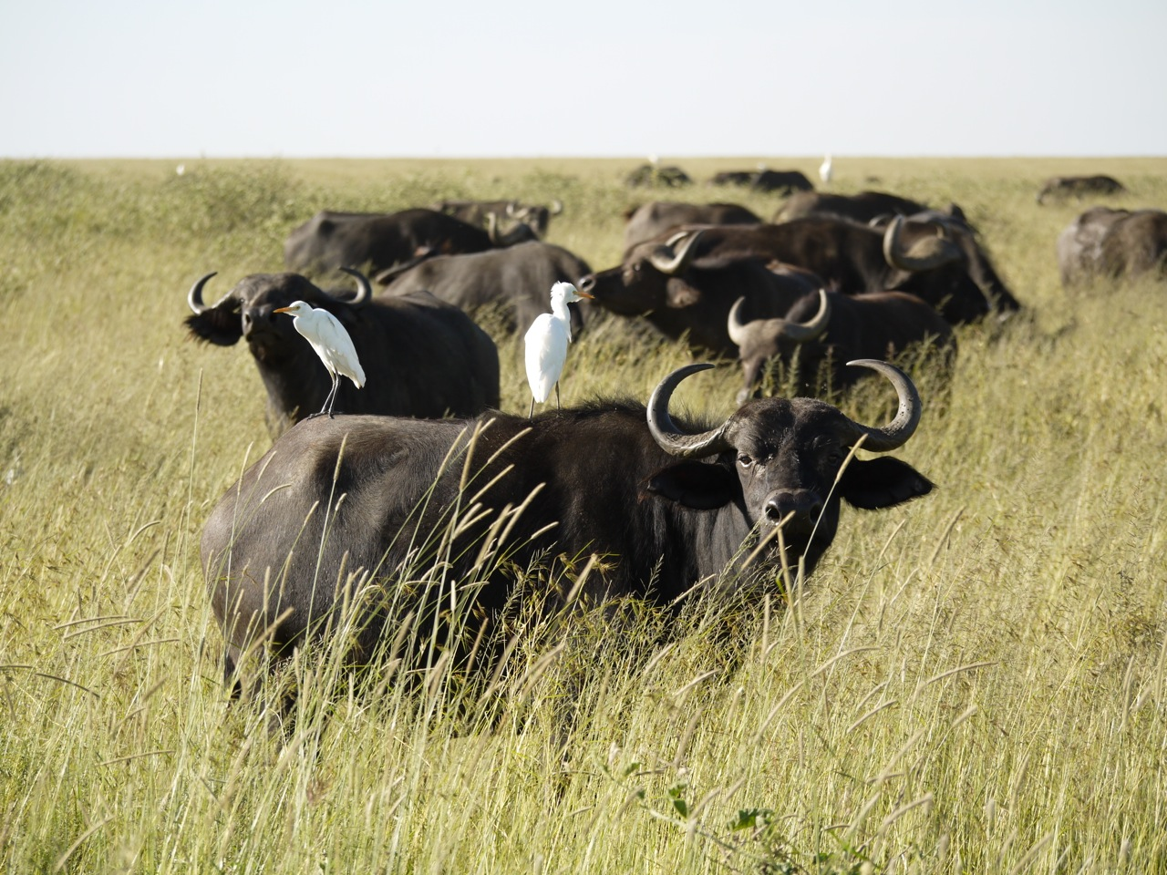 Buffels Ngorongoro / Serengeti